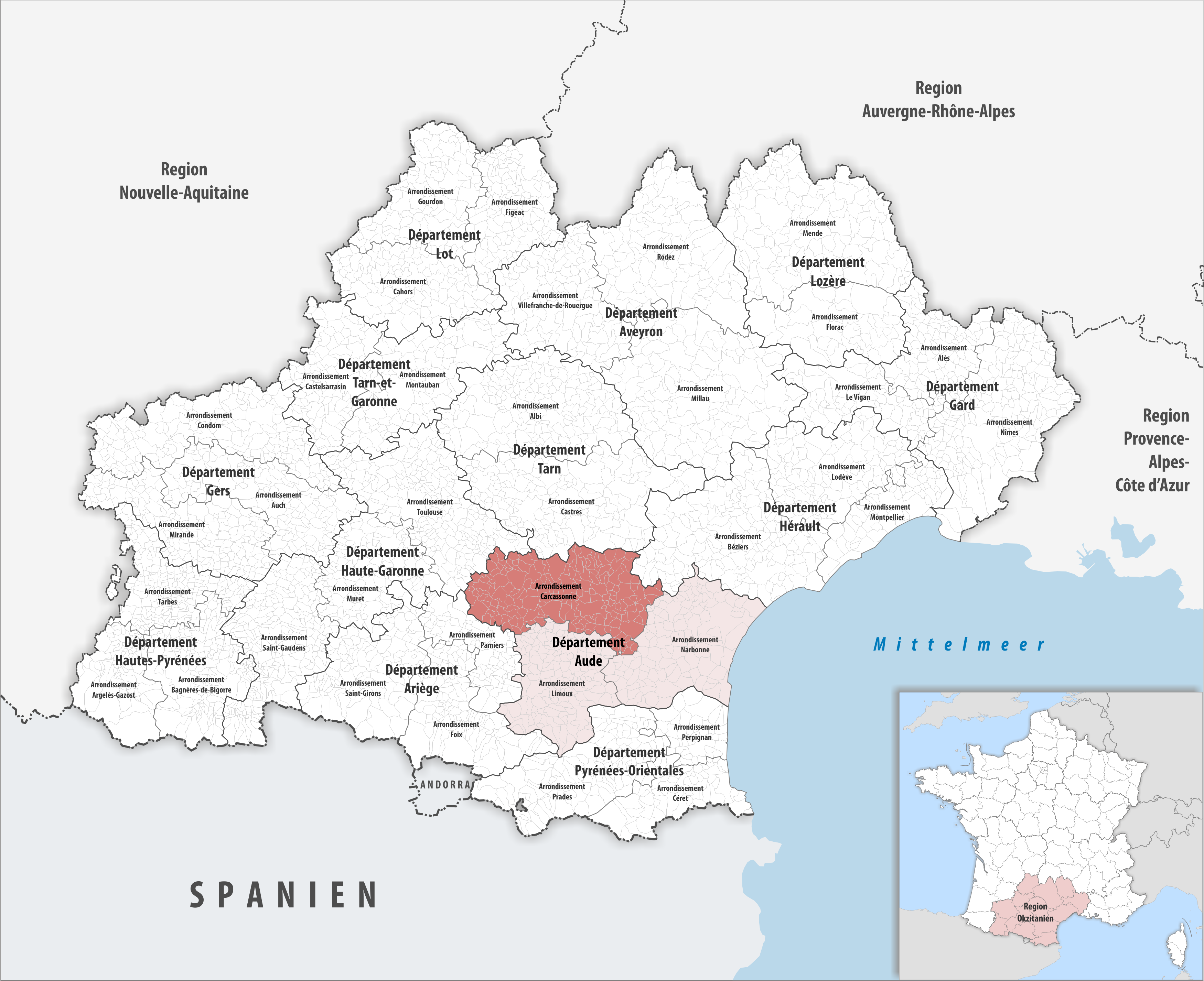 Lage des Arrondissements Carcassonne